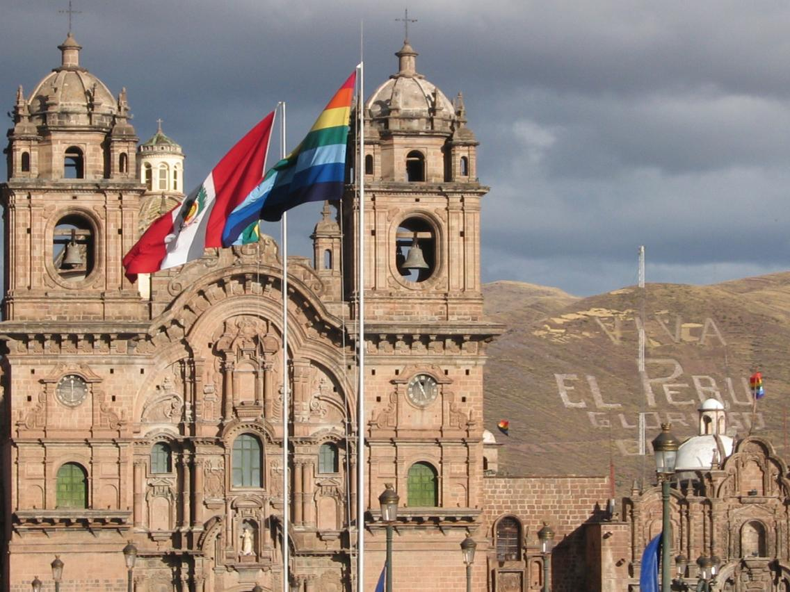 דגל האינקה בקוסקו